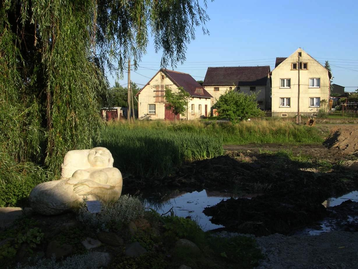 Dreiseithof in Leppersdorf (Sachsen). Skulptur „Die Nixe“